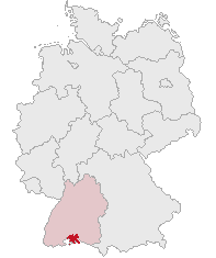 Landkreis Konstanz, Baden-Württemberg, Germany